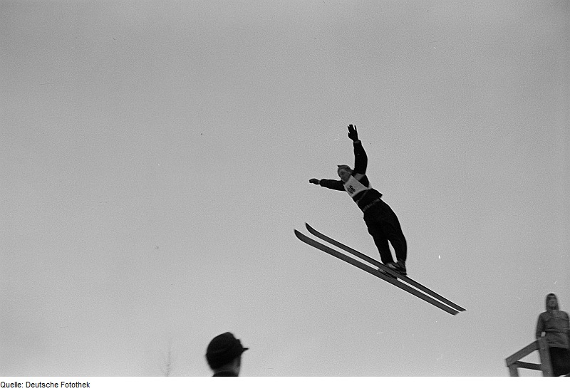 Original image description from the Deutsche FotothekSkispringen auf der "Schanze des Friedens"